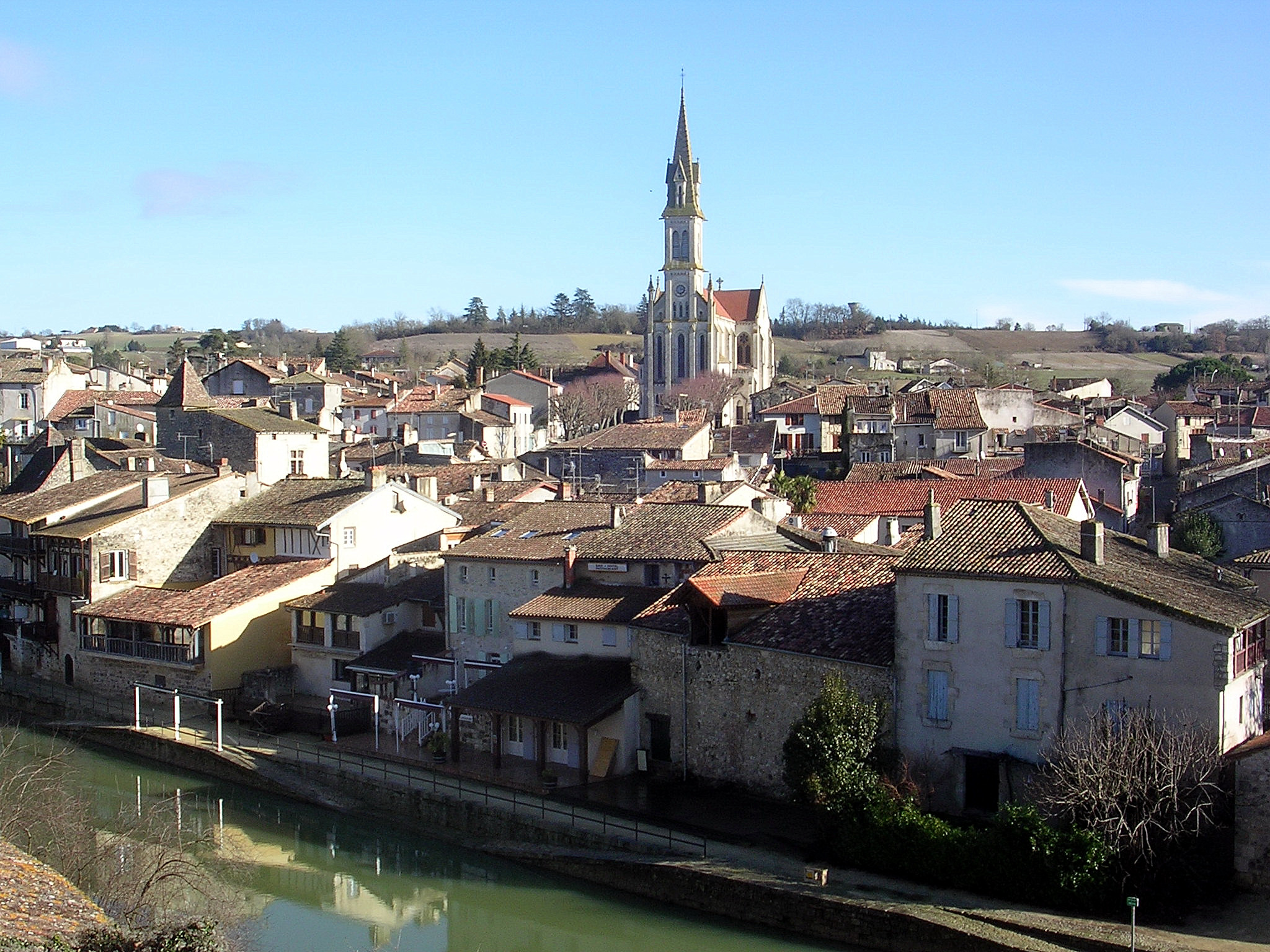 Le Petit Nérac, baigné par la Baïse, Lot-et-Garonne, France